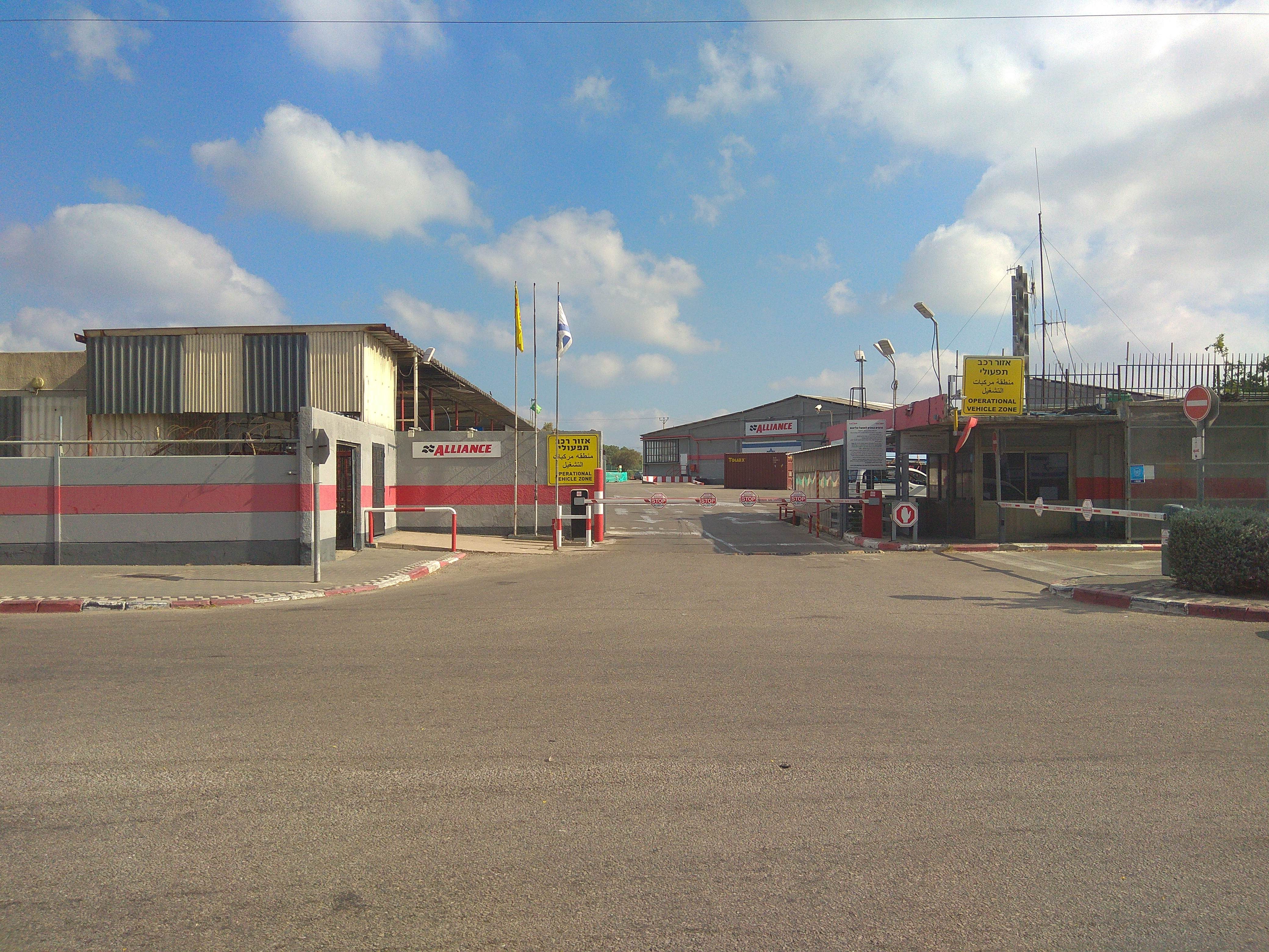 מפעל אליאנס